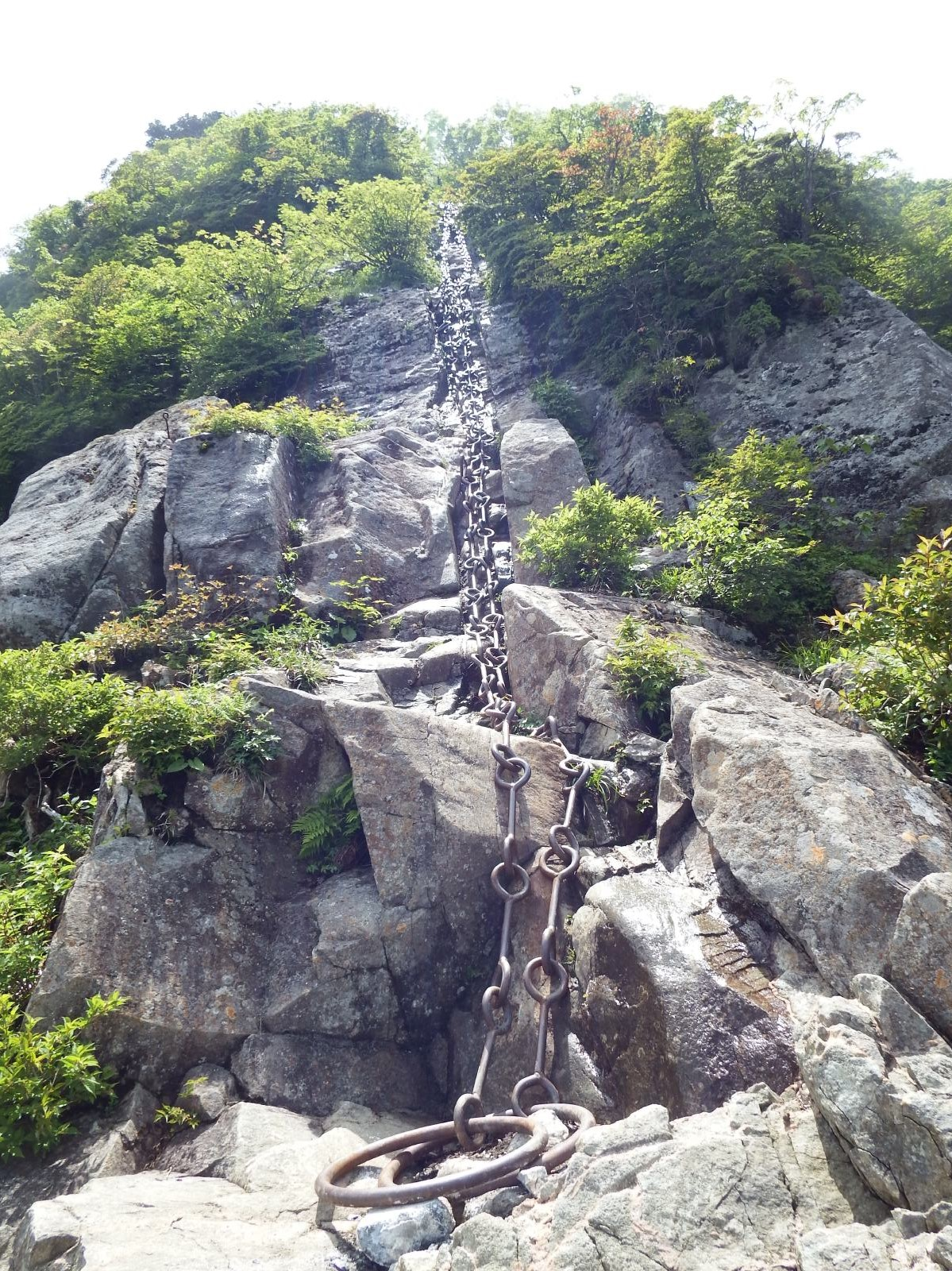 石鎚山三の鎖（上り）